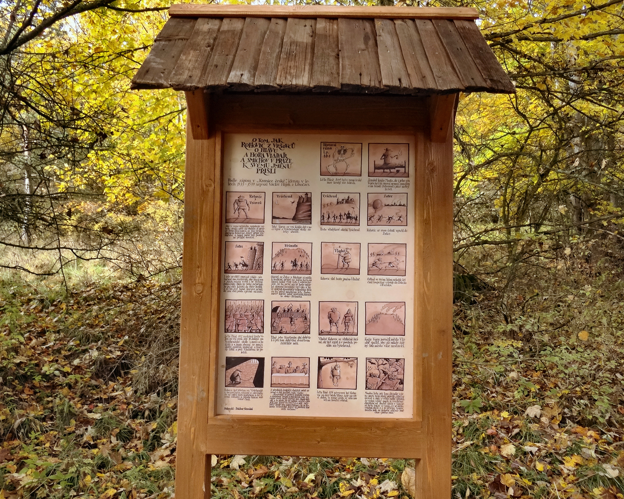 Ručně malovaná tabule Cesty za pověstí